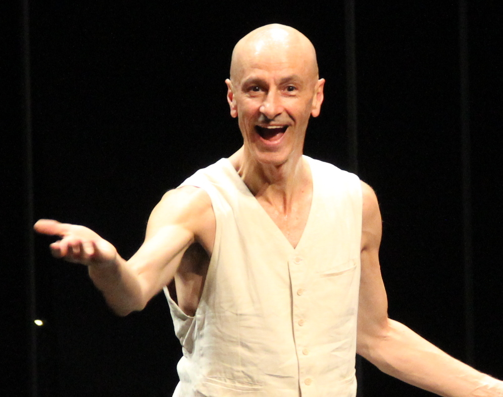 L'Institut Ramon Llull ha triat el Mercat de les Flors per commemorar el desè aniversari amb Indisciplines, una cruïlla de dansa i altres arts. Seran sis peces que es podran veure del 28 al 30 de setembre de 2012